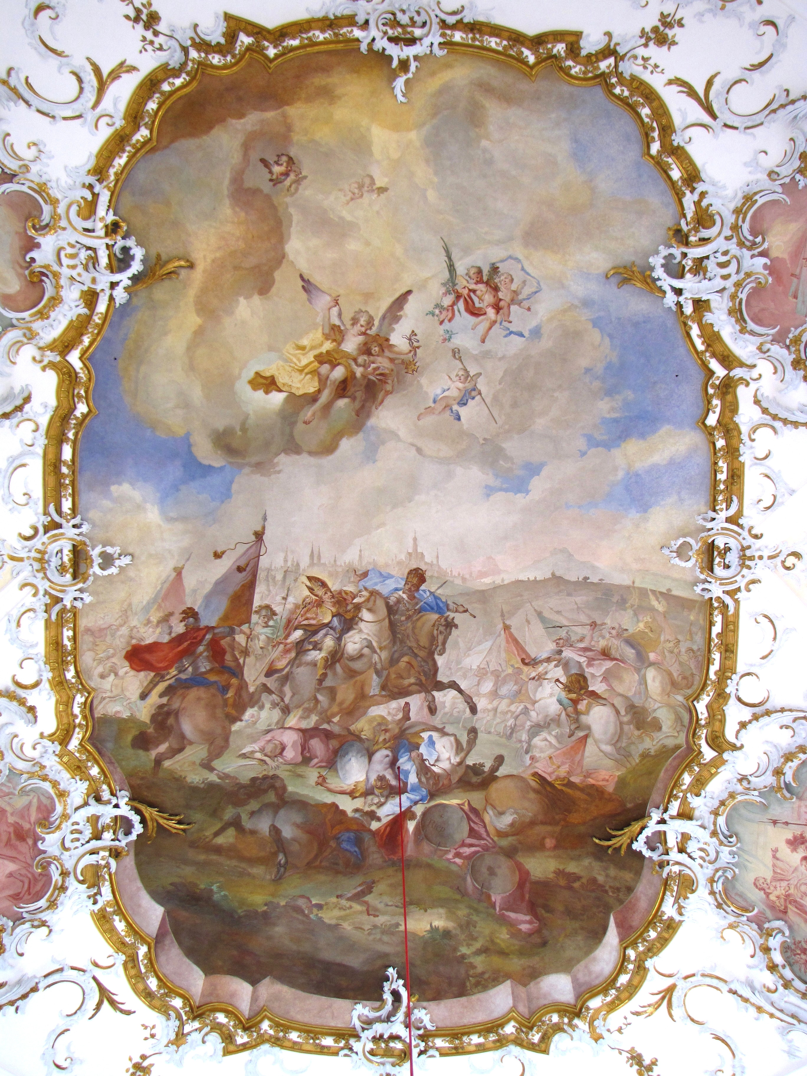 Die Schlacht auf dem Lechfeld, Deckenfresko von Balthasar Riepp, 1744, in der Pfarrkirche Seeg